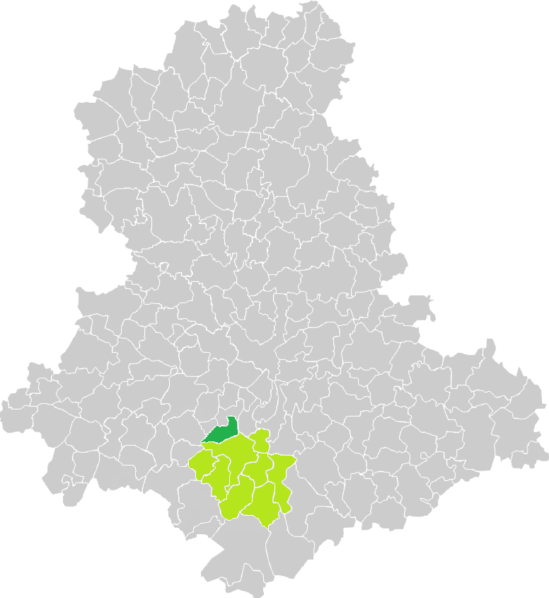 Carte de situation de la commune de Meilhac (en vert foncé) dans le votre Canton (en vert clair) sur une carte des communes de la Haute-Vienne